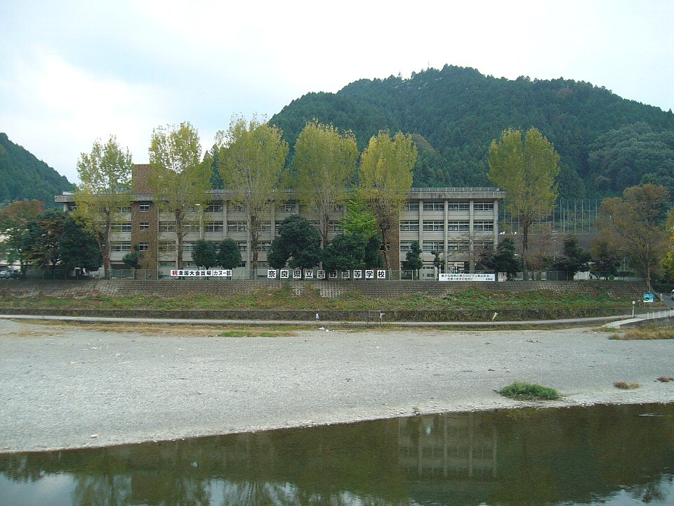 奈良県立吉野高等学校 手前は大和川 対岸の国道169号から望む